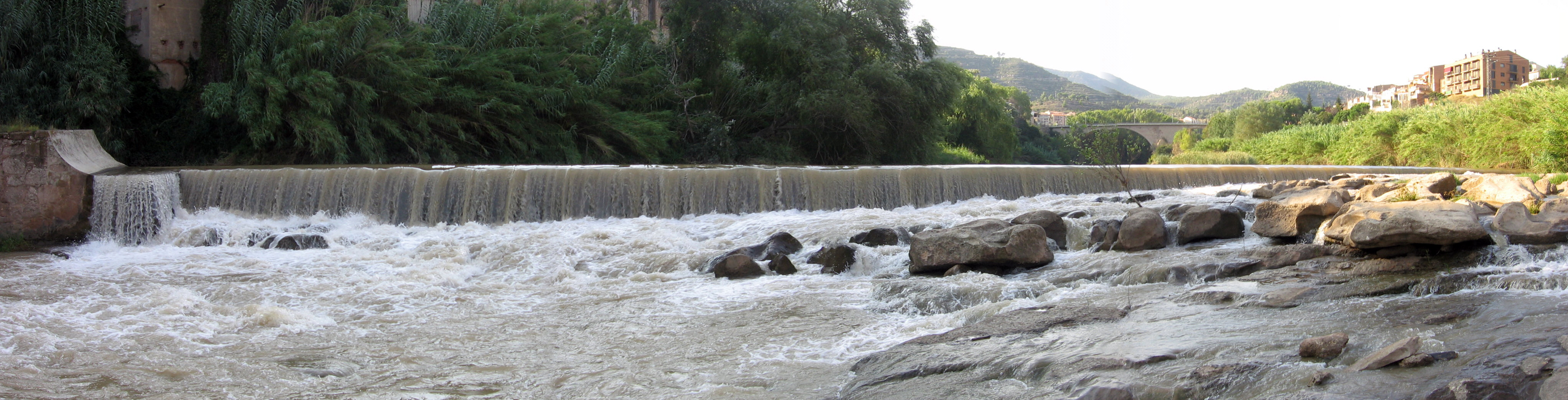 El Llobregat a su paso por Monistrol de Montserrat.